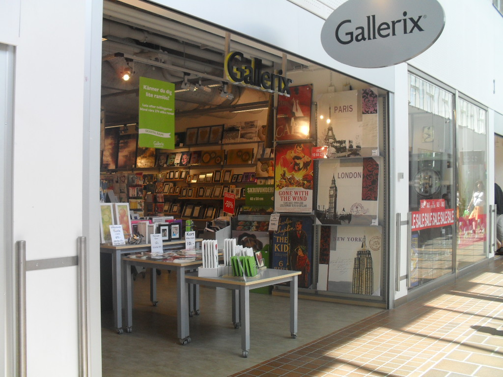 Gallerix